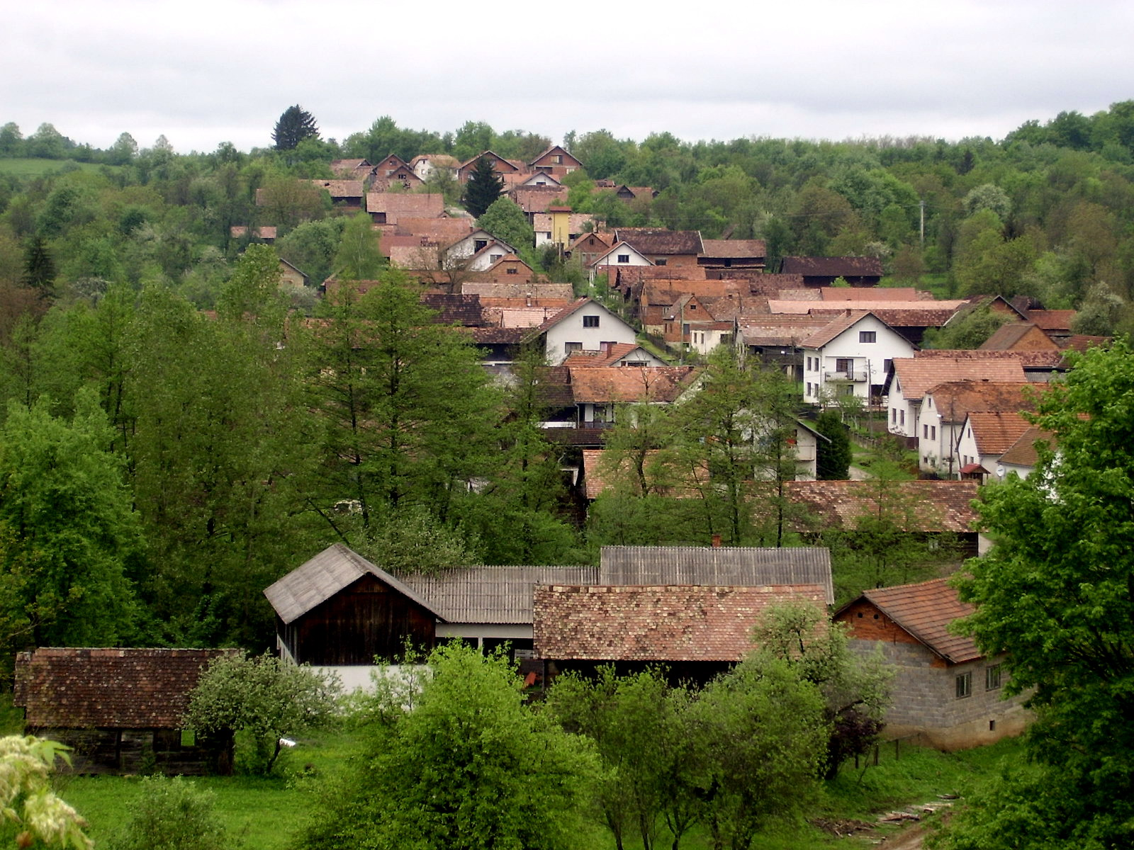 Gornja Velešnja - panorama